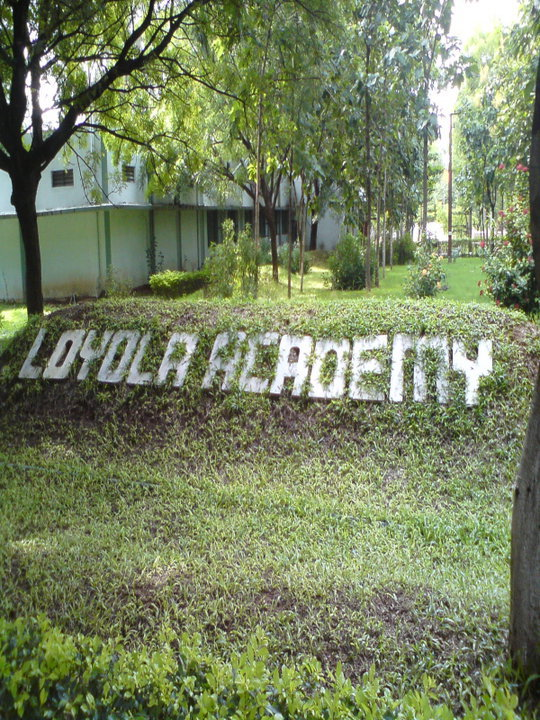 Loyola Academy